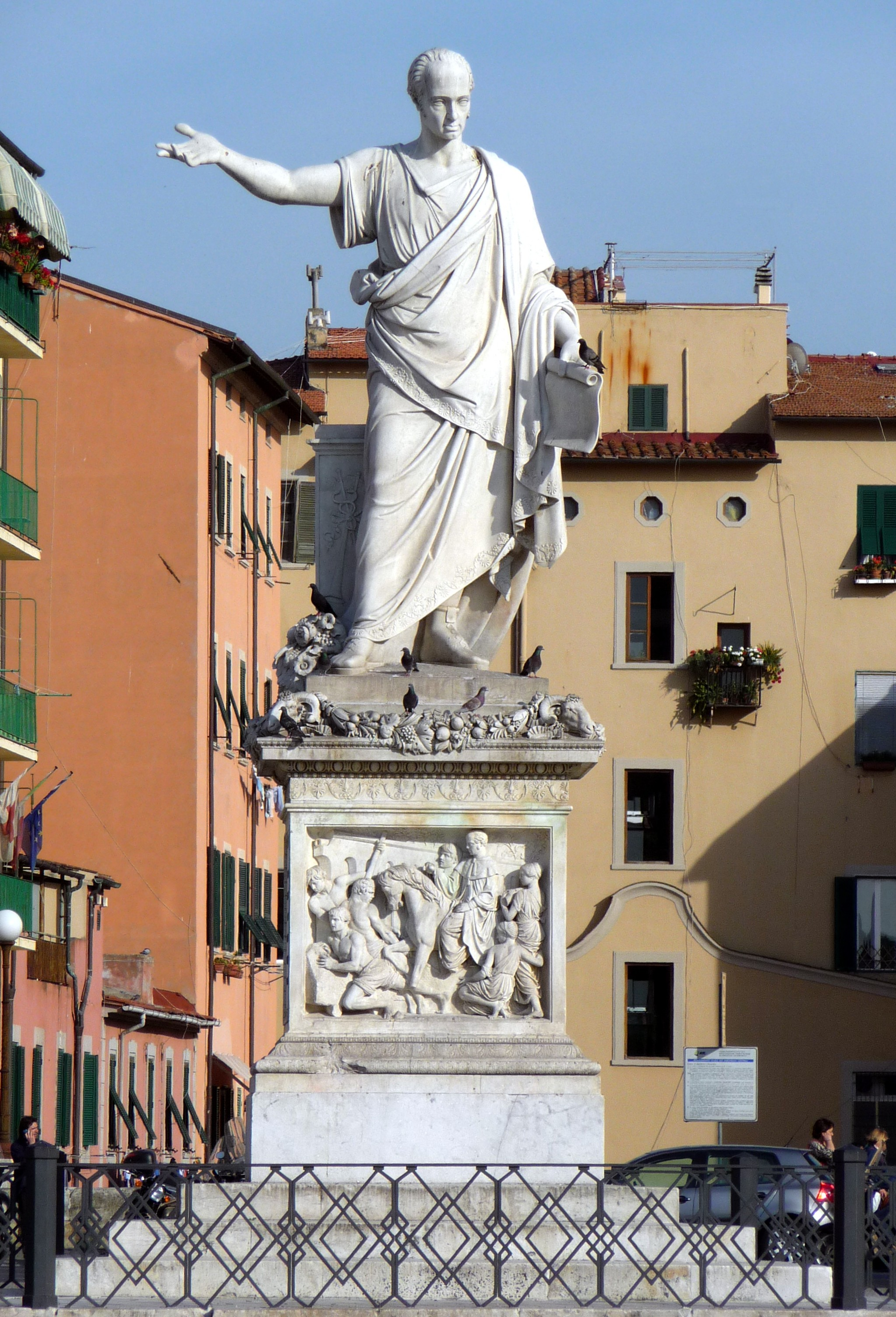 Monument for Ferdinando III, Piazza Repubblica, Livorno, Italy